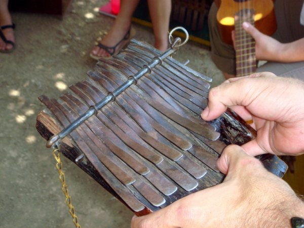 Desde Zimbahue